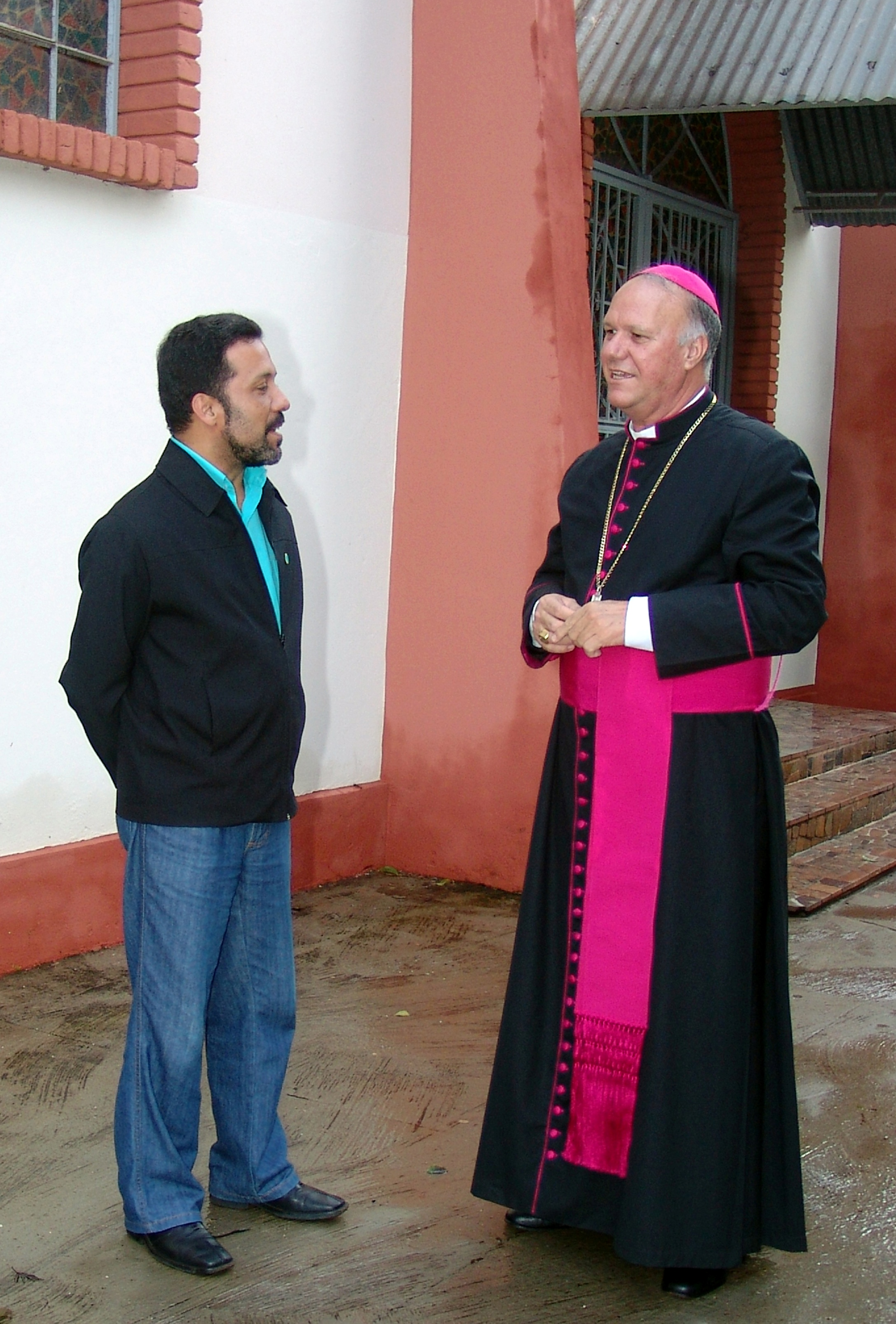 Mauro Aparecido dos Santos, Dom, sacerdote católico brasileiro, arcebispo de Cascavel.